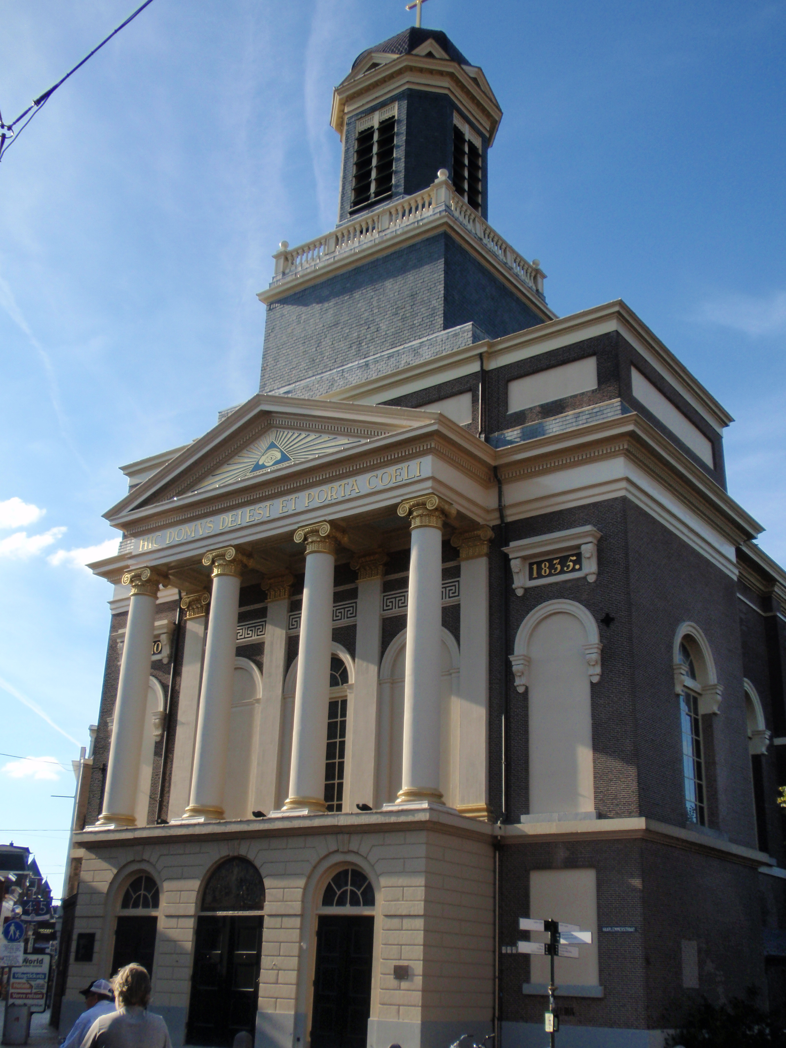 rijksmonumenten gefotografeerd in Leiden.